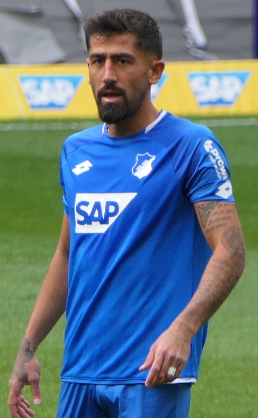 Der Fussballprofi Kerem Demirbay im Trikot der TSG 1899 Hoffenheim beim Heimspiel gegen den SV Werder Bremen am 11.05.2019.